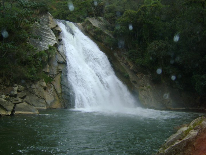 Antes de la caída, es decir la parte superior de la Catarata es el límite del distrito de Anguía con Tacabamba.